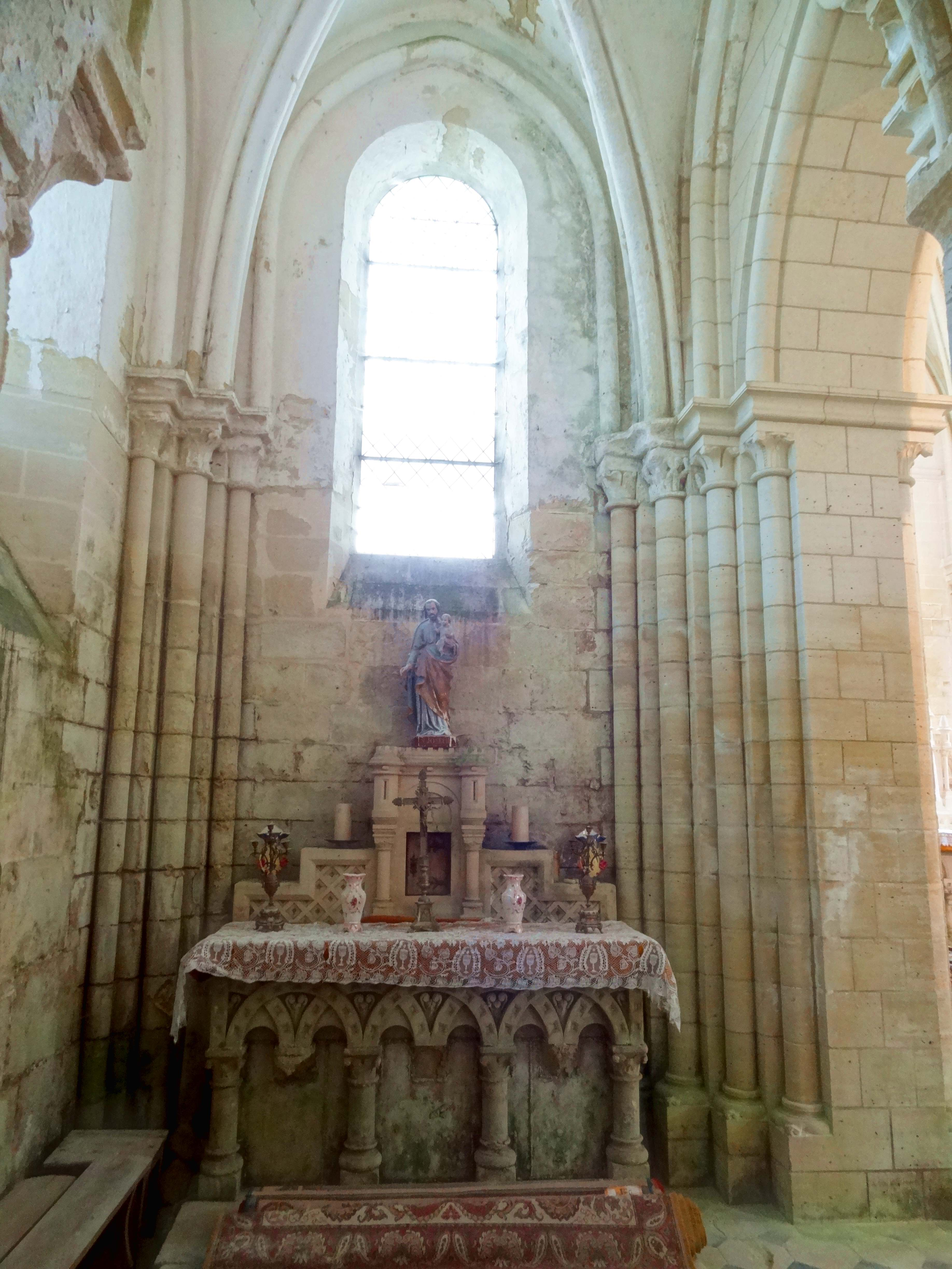 Intérieur de l'église - voir titre.